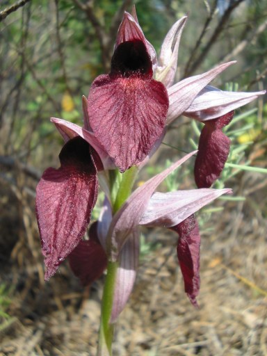 Serapias cordigera dans les environs de Fréjus, fin-mai 2004.